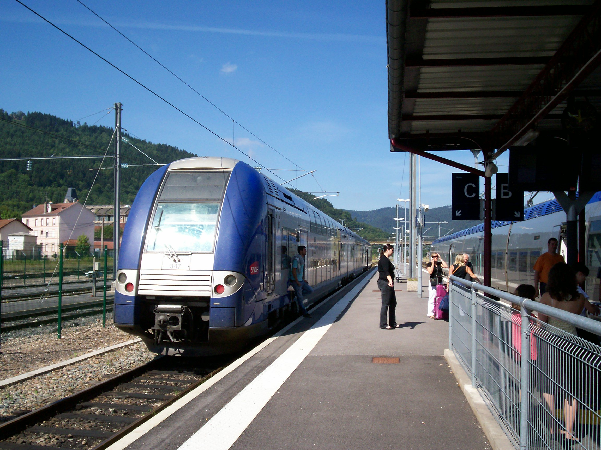 TER Lorraine